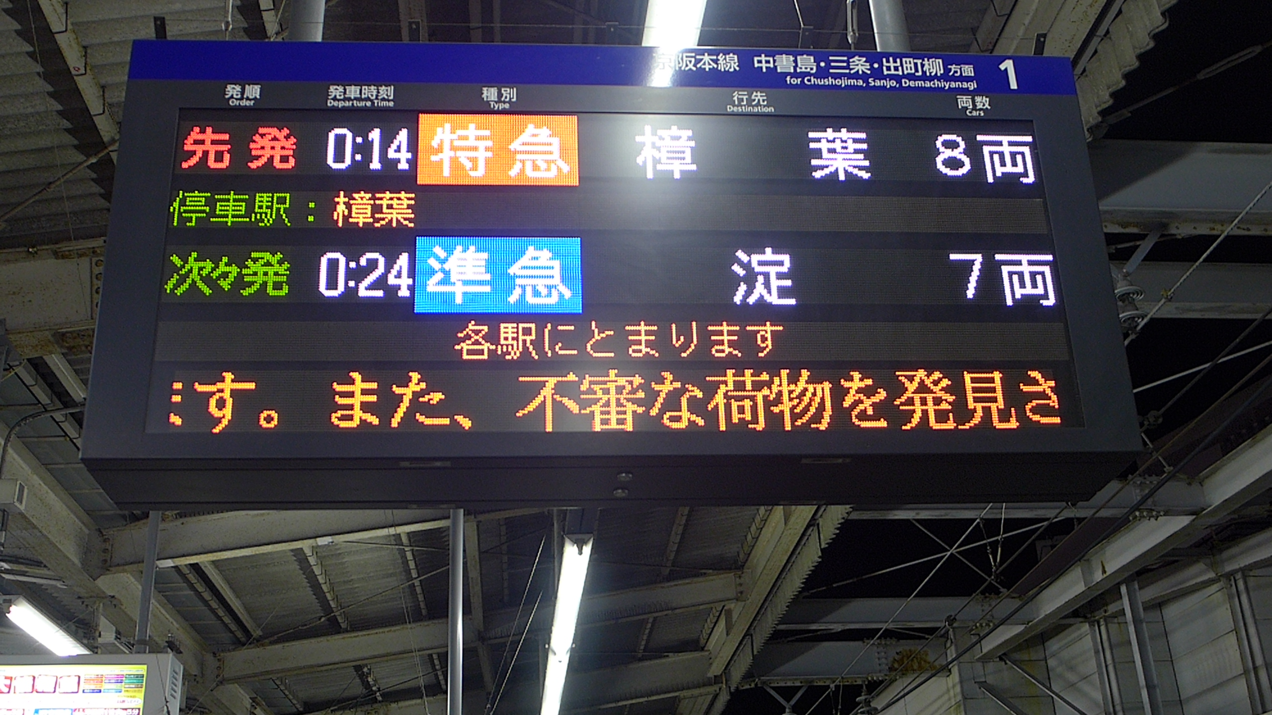 京阪枚方市駅：フルカラー式LED到着列車案内